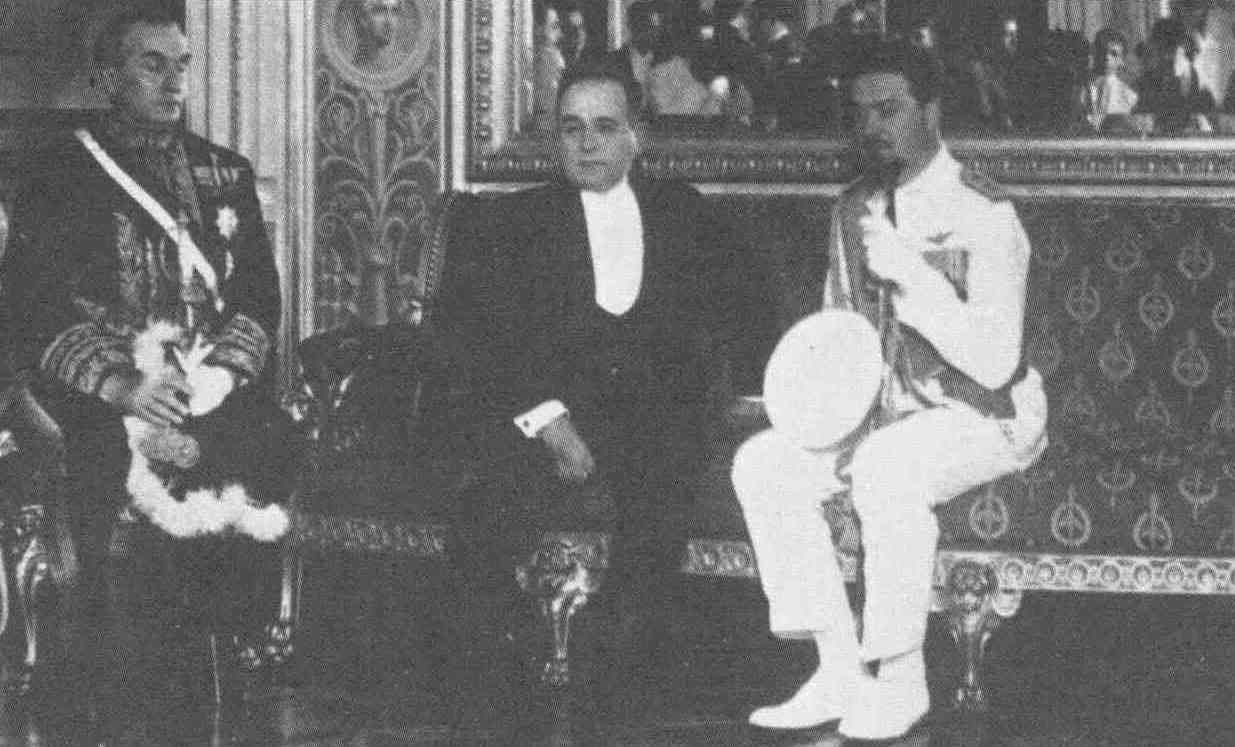 O Ministro da Aeronáutica da Itália Fascista, Italo Balbo, é recebido no Palácio do Catete por Getúlio Vargas.